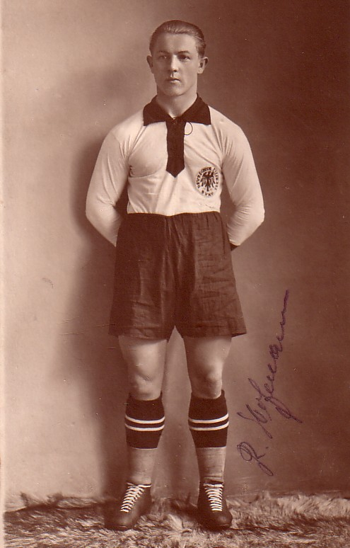 Autogrammfoto von Richard Hofmann